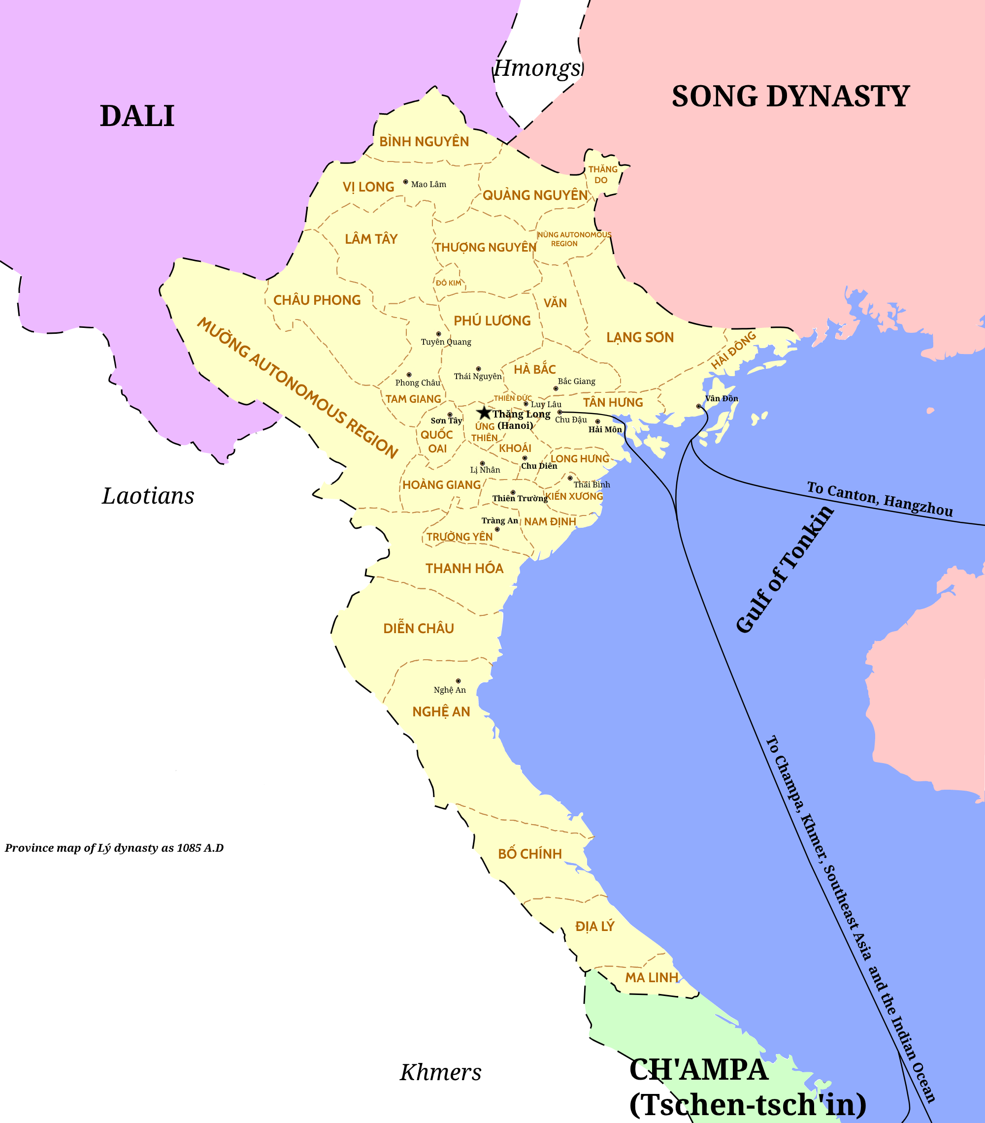 Bản đồ hành chính Việt Nam thời nhà Lý, năm 1085.